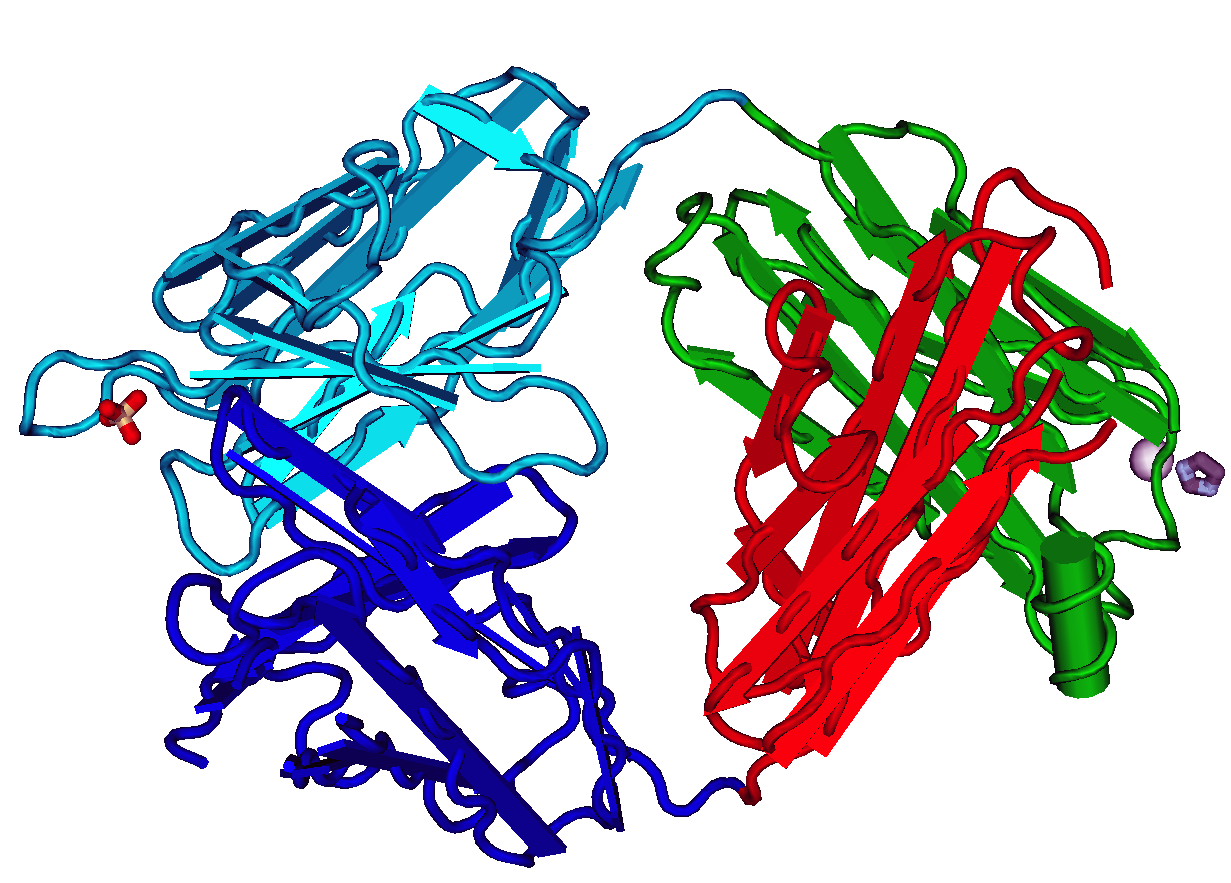 1MRC_Igg_Jel_103_Fab_Fragment